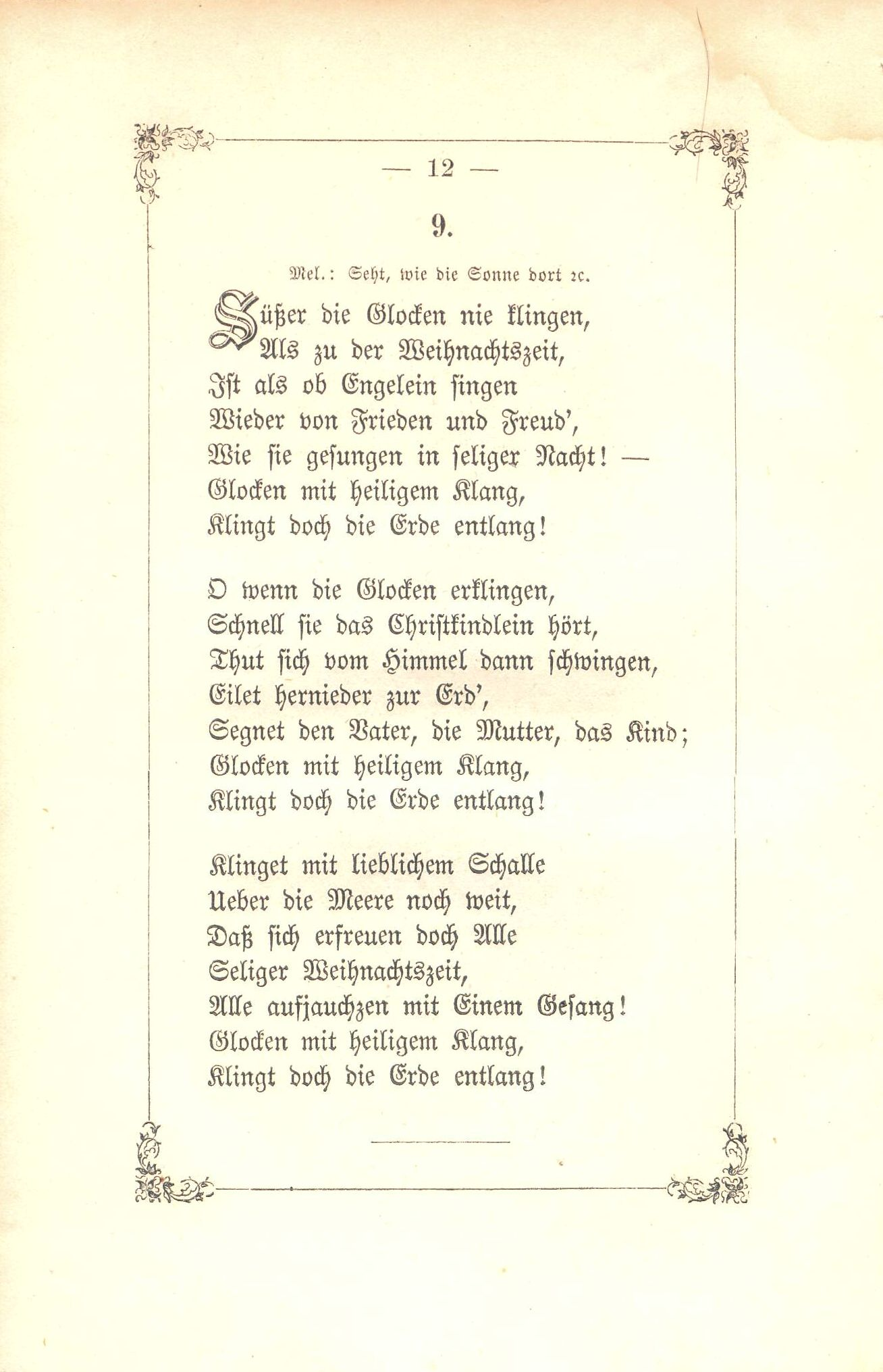 W. Kritzinger: Weihnachtsbüchlein für Schule und Haus. Zeitz : Webel, 1866, S. 12